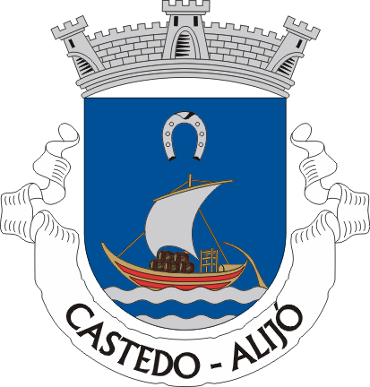 Brasão de Castedo, Alijó